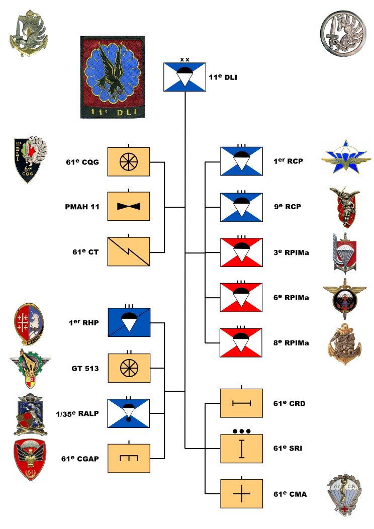 Organigramme, symbole Otan et insignes, de la 11e division légère d'intervention française entre le 1er mai 1961 et le 30 novembre 1963 (Cf. revue uniformes n° 278, sept-oct 2011, page 30).